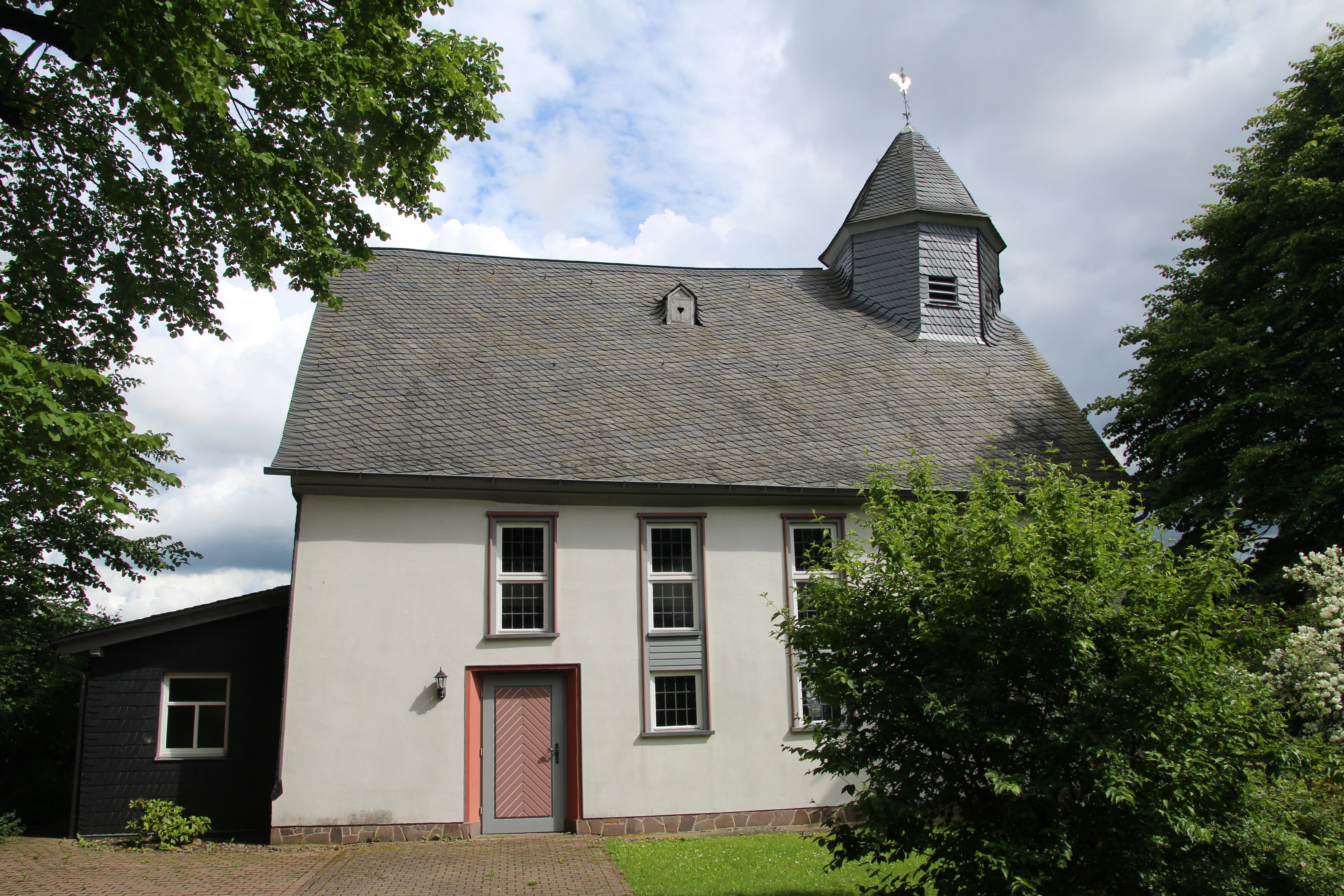 Foto